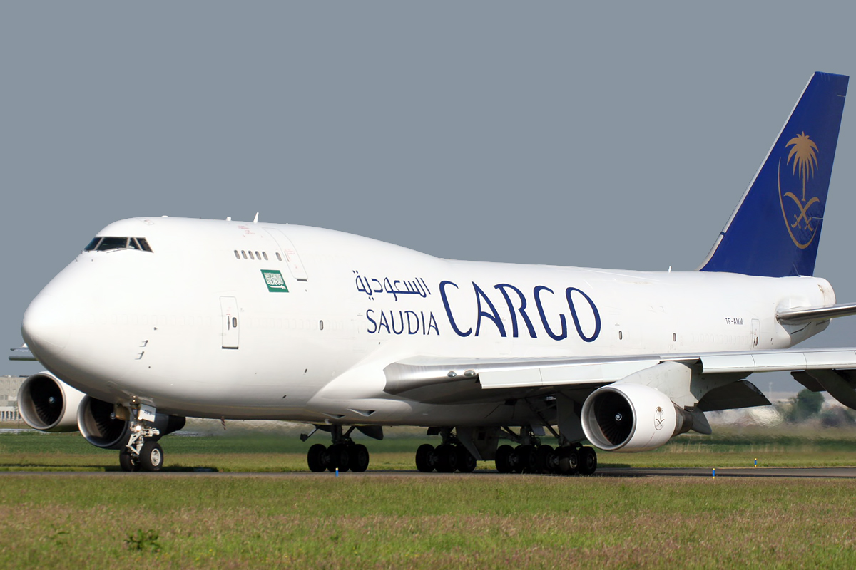 Amsterdam (EHAM/AMS) Airport